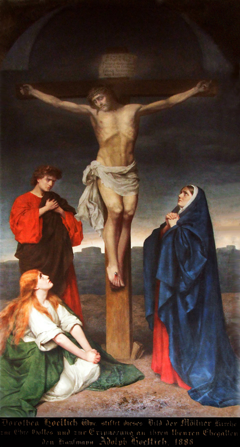 Kreuzigungsgruppe von Mathilde Block von 1888, gestiftet von Dorothea Hoeltich (Es hängt an der Rückseite des Altars)